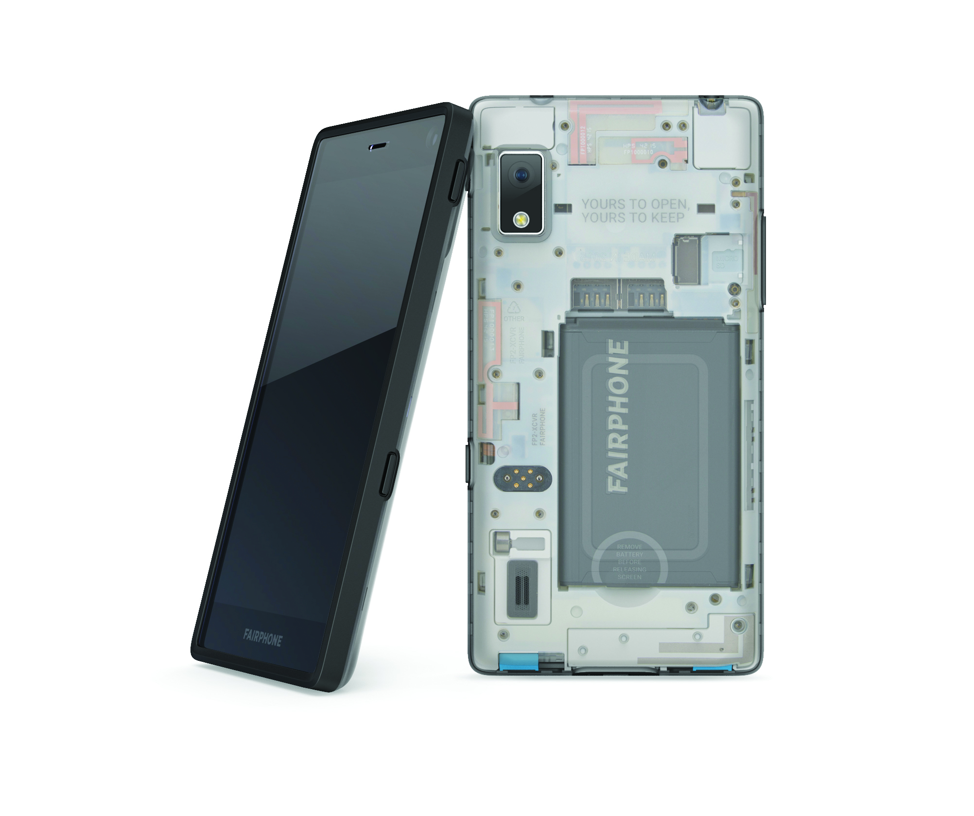 SIDE VIEW transparent